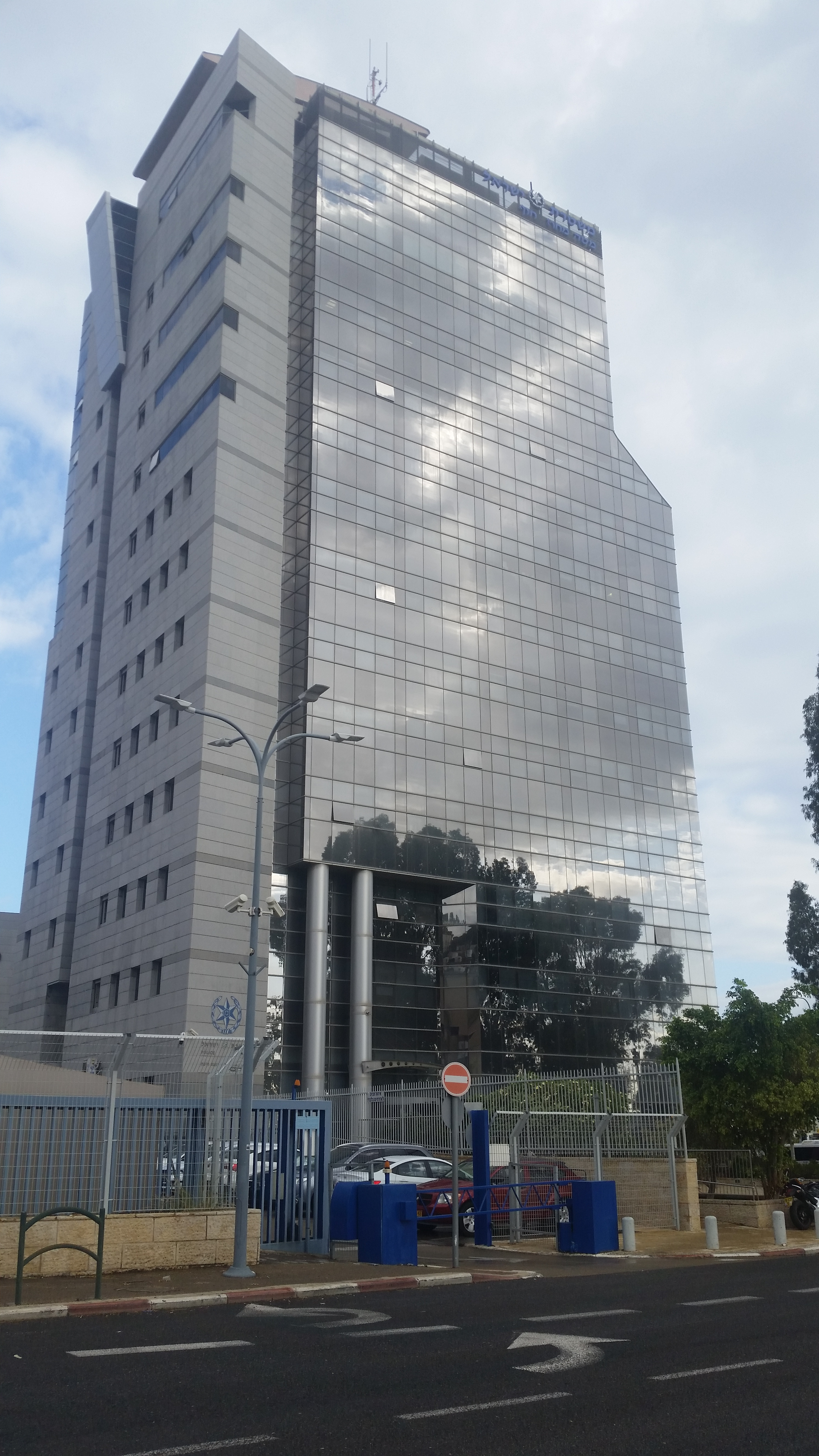 בניין משטרת מחוז חוף השוכן בחיפה בעיר התחתית בין רחוב נתן אלבז לרחוב יהודה ארזי.